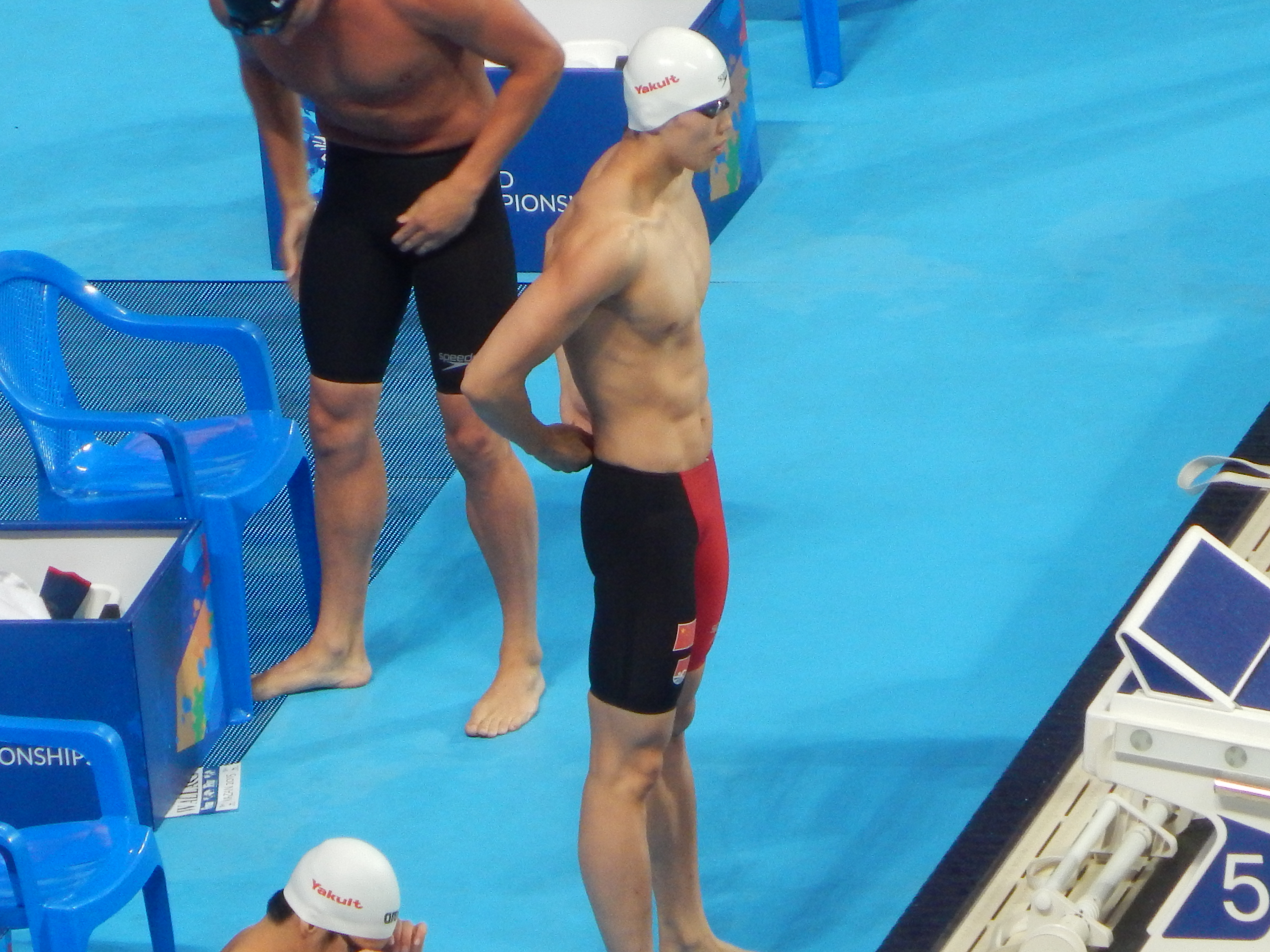 Вэн Шунь в Казани 200 метров комплекс